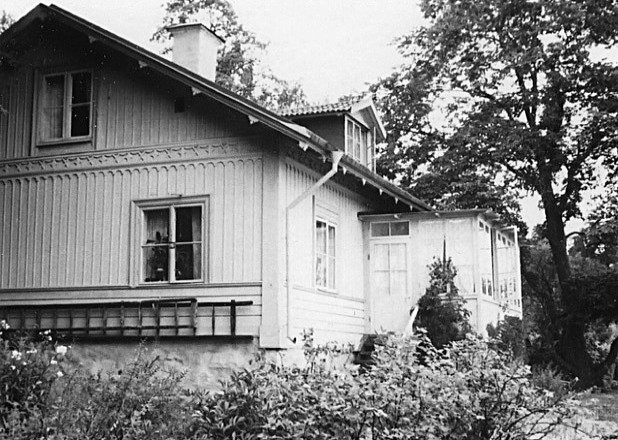 Strandstugan, Ulriksdal, även kallad Vaktmästarbostaden.